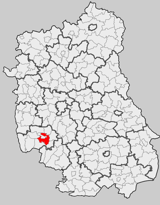 Map of gmina Kraśnik (rural), Kraśnik county, Lublin voivodship Mapa gminy Kraśnik (wiejska), powiat kraśnicki, województwo lubelskie